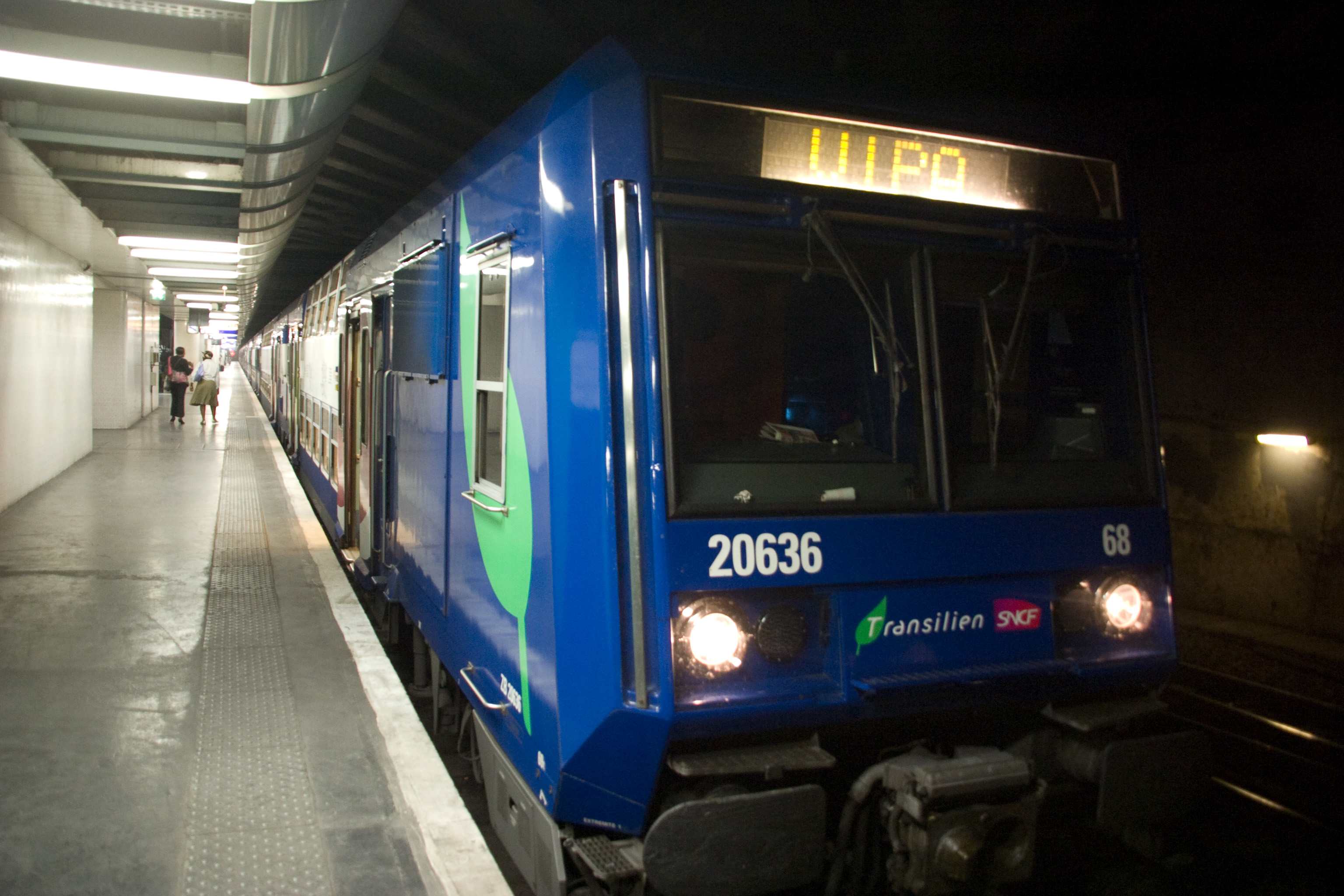 Station Châtelet - Les Halles, Paris, France